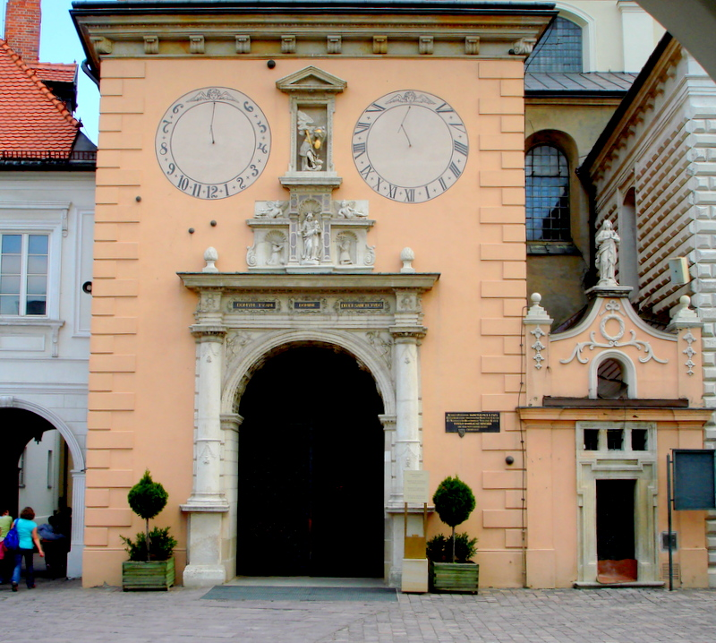 Częstochowa, zespół klasztorny oo. Paulinów na Jasnej Górze